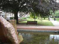 Pink Granite Fountain, Rubislaw Terrace Gardens, Aberdeen, Scotland. Category:Aberdeen